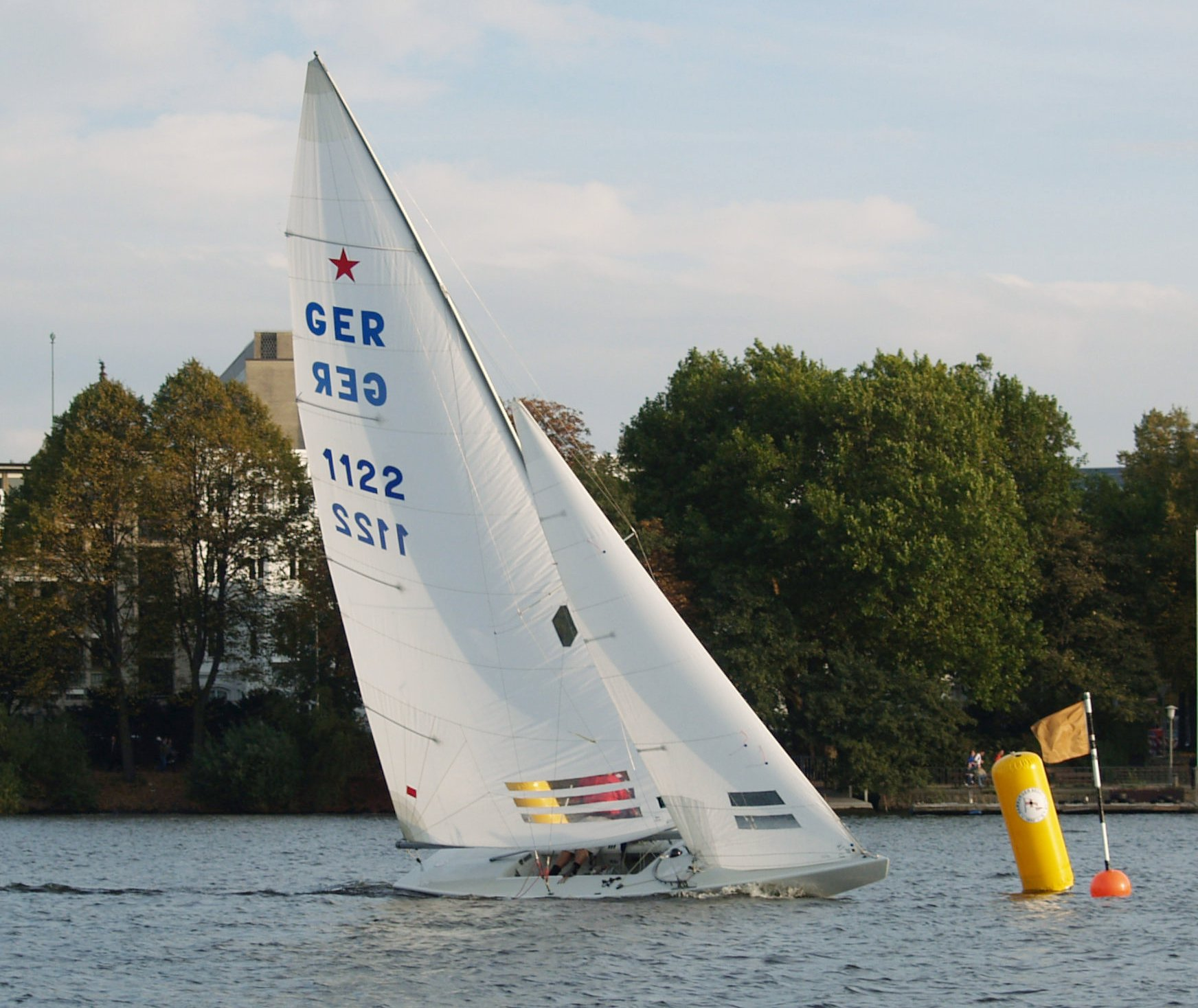 Star